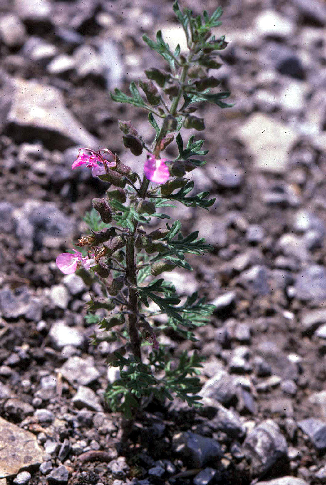 Teucrium botrys, Unterfranken